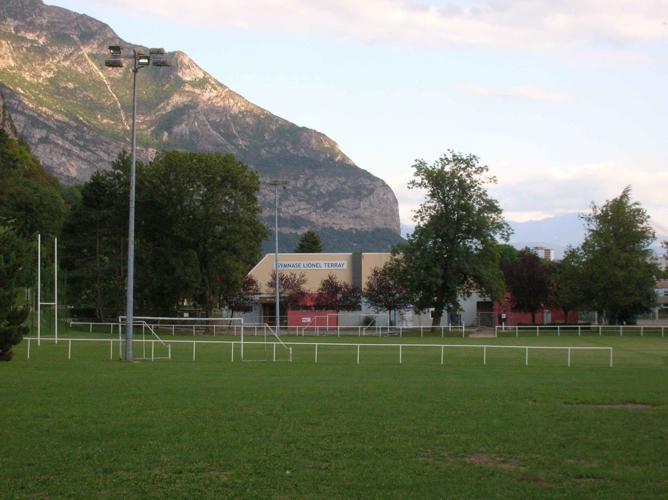 gymnase Lyonel Terray. Fontanil-Cornillon, Isère, AuRA, France.